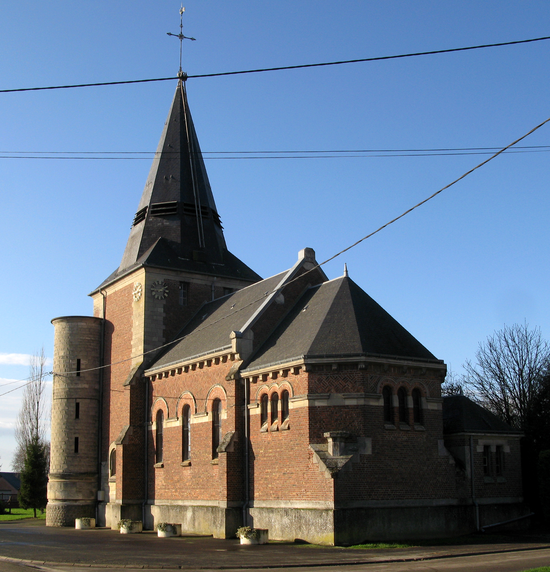 Poeuilly (Somme, France) - L'église. .